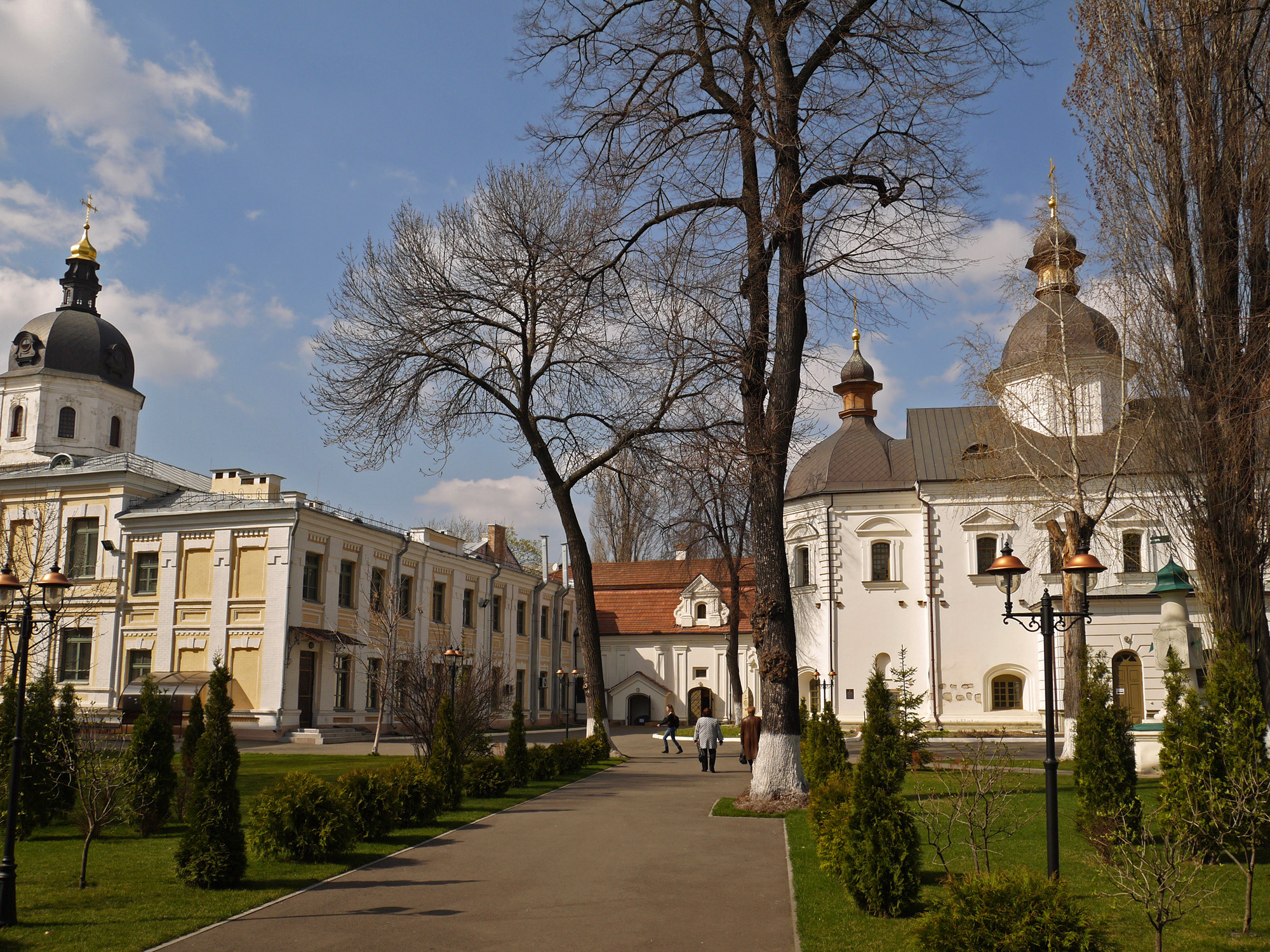 Комплекс споруд Києво-Могилянської академії (ансамбль Братського монастиря), Київ, Контрактова пл., 3